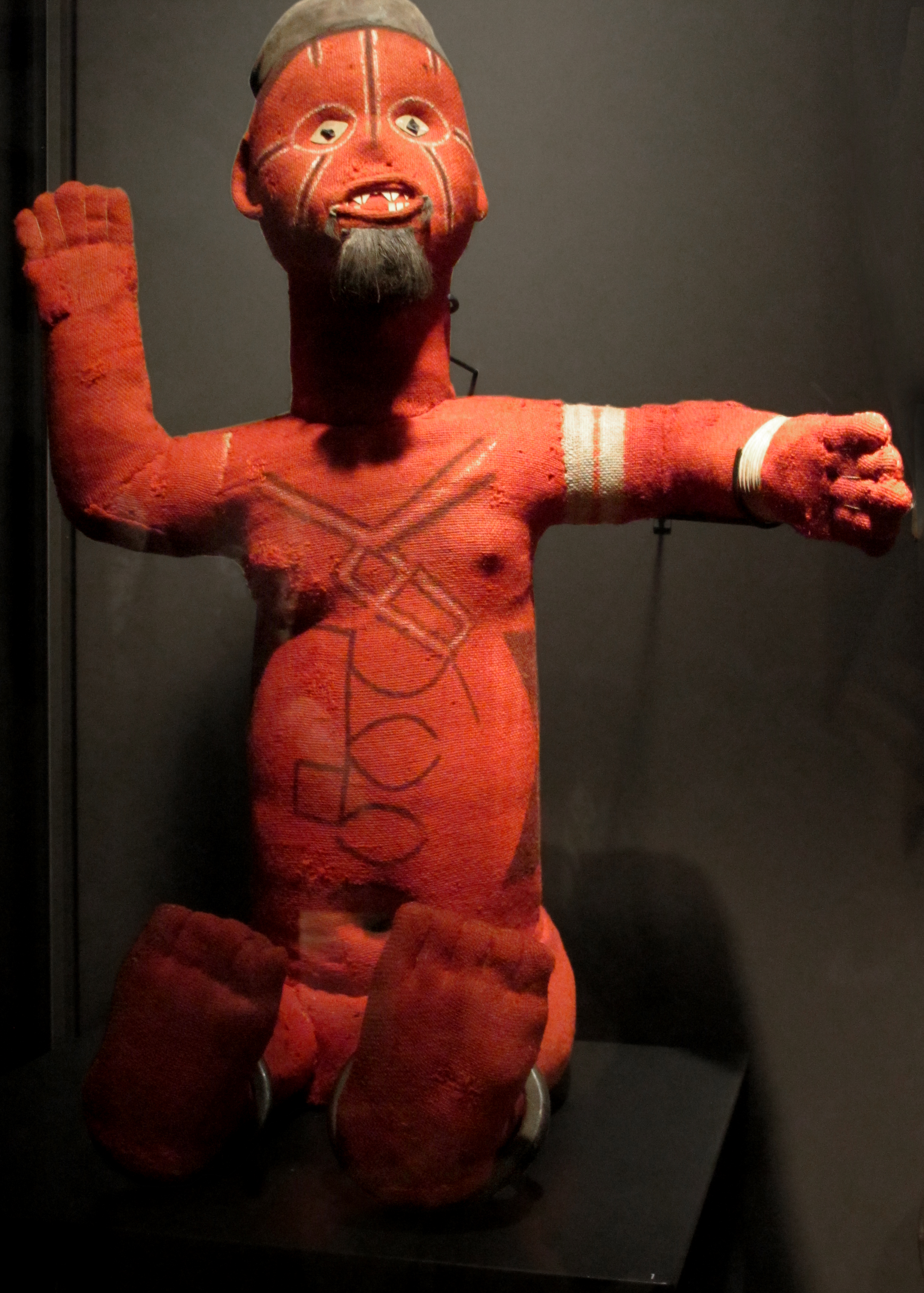 Muziri, population bembe (ou bemba), plateaux de la vallée du Niari. République du Congo. Tissus, rotin, fibres végétales, laiton, poils. Collecte du lieutenant J.C.E. Briaud en 1911. Don du Commandant J.C.E. Briaud en 1923. Muséum d'histoire naturelle de La Rochelle. H. 2442 [1] Notice sur la population bembe ou bemba.